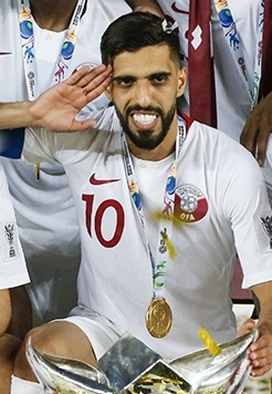 دیدار فینال جام ملت‌های 2019 آسیا بین تیم ملی فوتبال قطر و ژاپن بعدظهر جمعه 12 بهمن در ورزشگاه زاید به قضاوت روشن ایرماتوف ازبکستانی برگزار شد.المعزعلی در دقیقه 12 و عبدالعزیر حاتم 27 و اکرم عفیف در دقیقه 83 با ضربه پنالتی برای قطر گلزنی کردند.برای ژاپن مینامینو 69 موفق به گشودن دروازه قطر شدند.